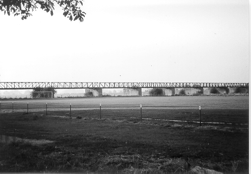 Die Flutbrücken der Altrheinbrücke